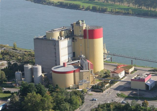 Schill Malz, Werk Worms